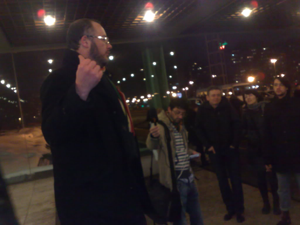 Boris Milićević na protestu GSA ispred Sava centra